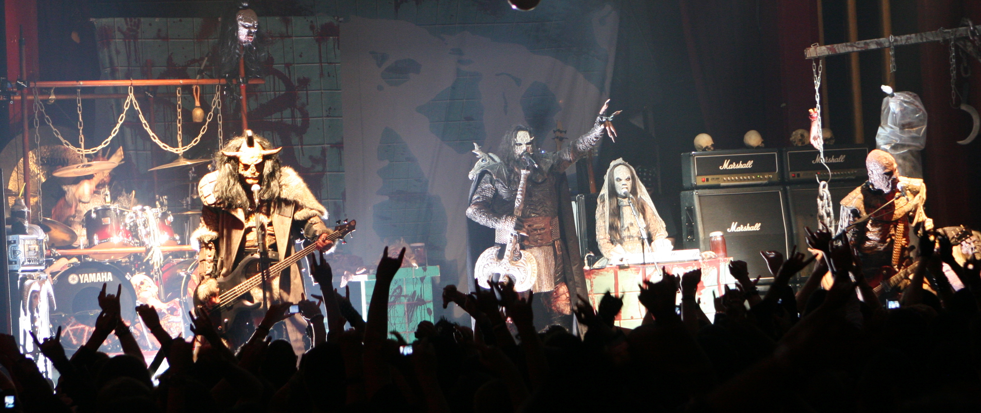 Lordi actuando en la sala Apolo de Barcelona.